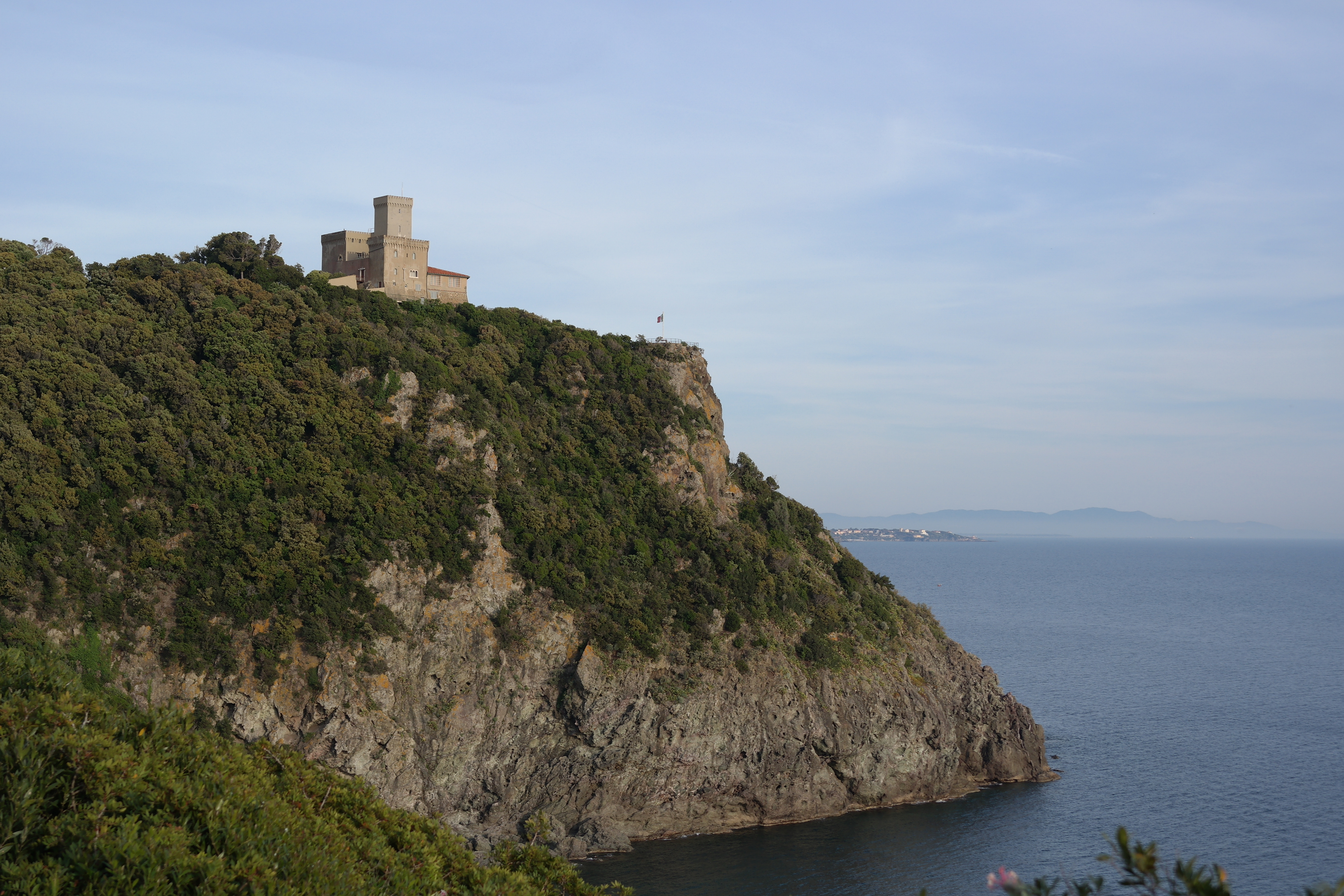 Castel Sonnino a Livorno